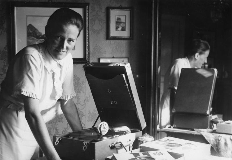 Marga von Etzdorf Marga v[on] Etzdorff 26435-32 [Porträt Marga von Etzdorf in einer Wohnung vor einem Plattenspieler stehend] Abgebildete Personen: Etzdorf, Marga von: 1907-1933; Kunstfliegerin, Deutschland (GND 12355800X)